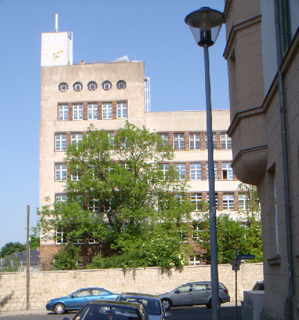 Friedrich-Schiller-Gymnasium 2009